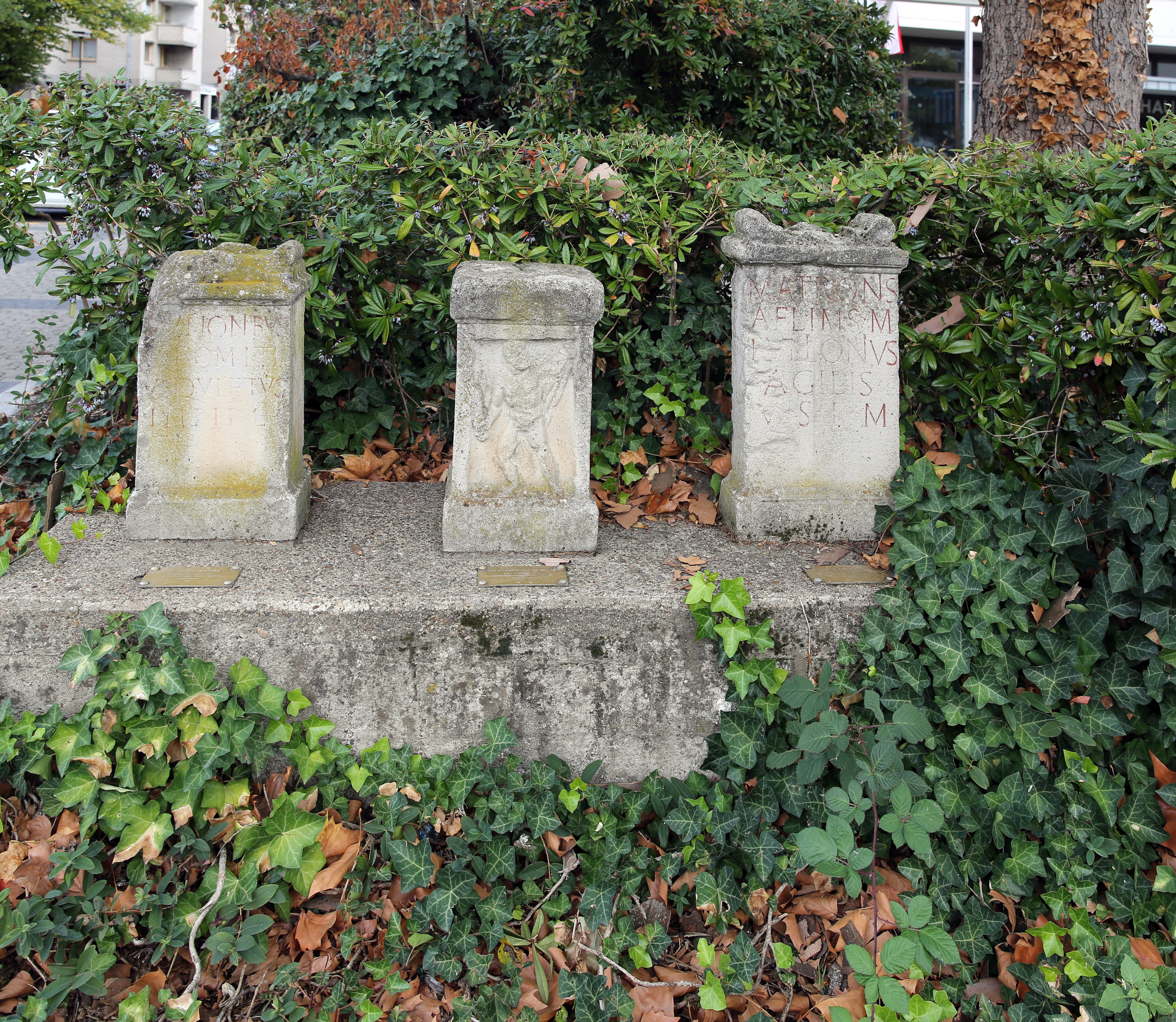 Weihealtäre (Nachbildungen) (2.-3. Jh.) für Hercules, Junones u. d. Matrone Afliae. FO. Nieder-Wesseling, 1882 an der alten Kirche. Seit 1984 vor dem neuen Rathaus in Wesseling aufgebaut